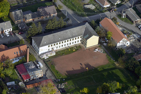 Szücsi légi fotó